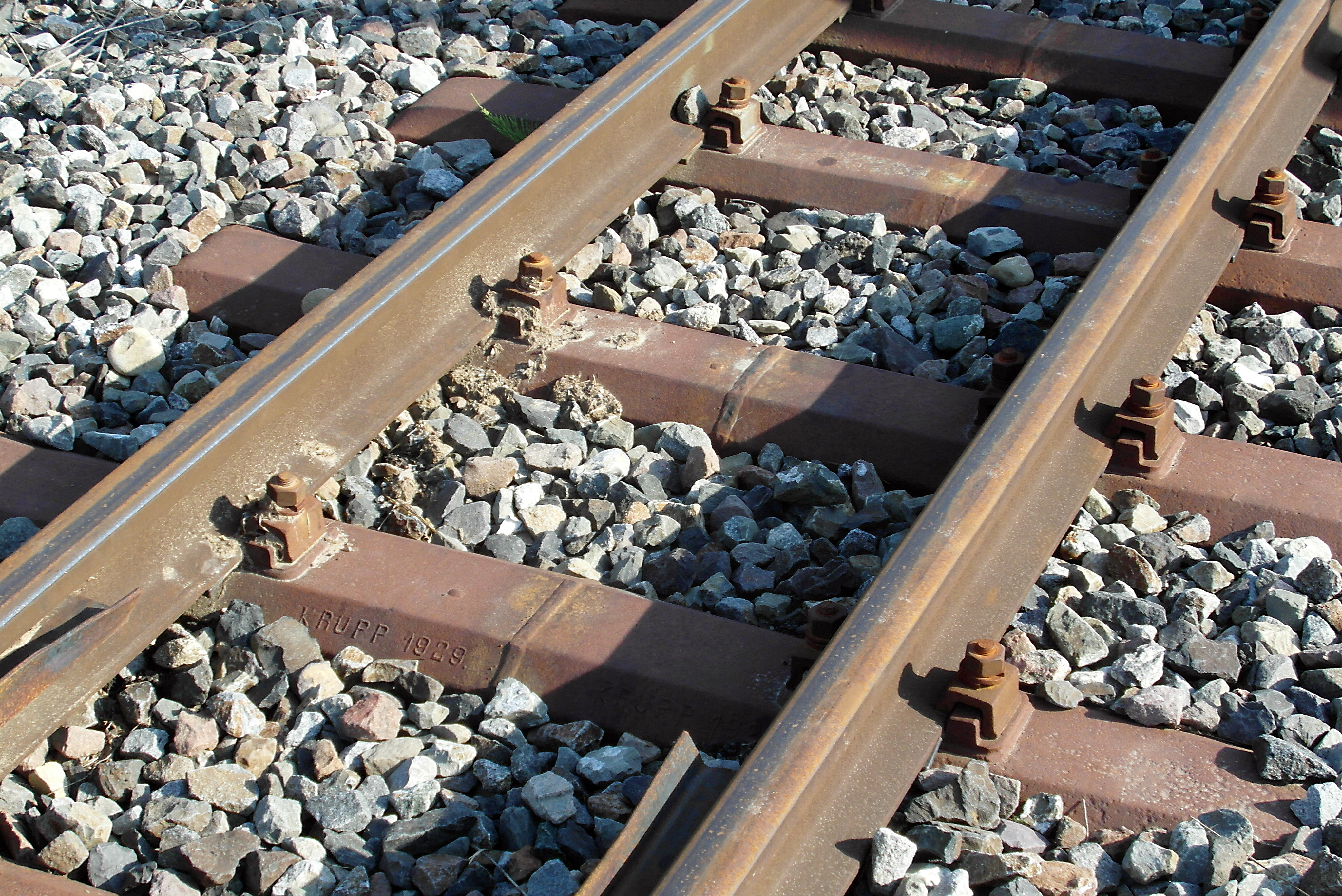 Stahlschwellengleis, Oberbau K. Die Schwellen wurden getrennt und stumpf für die Spurweite von 750 Millimetern geschweßt